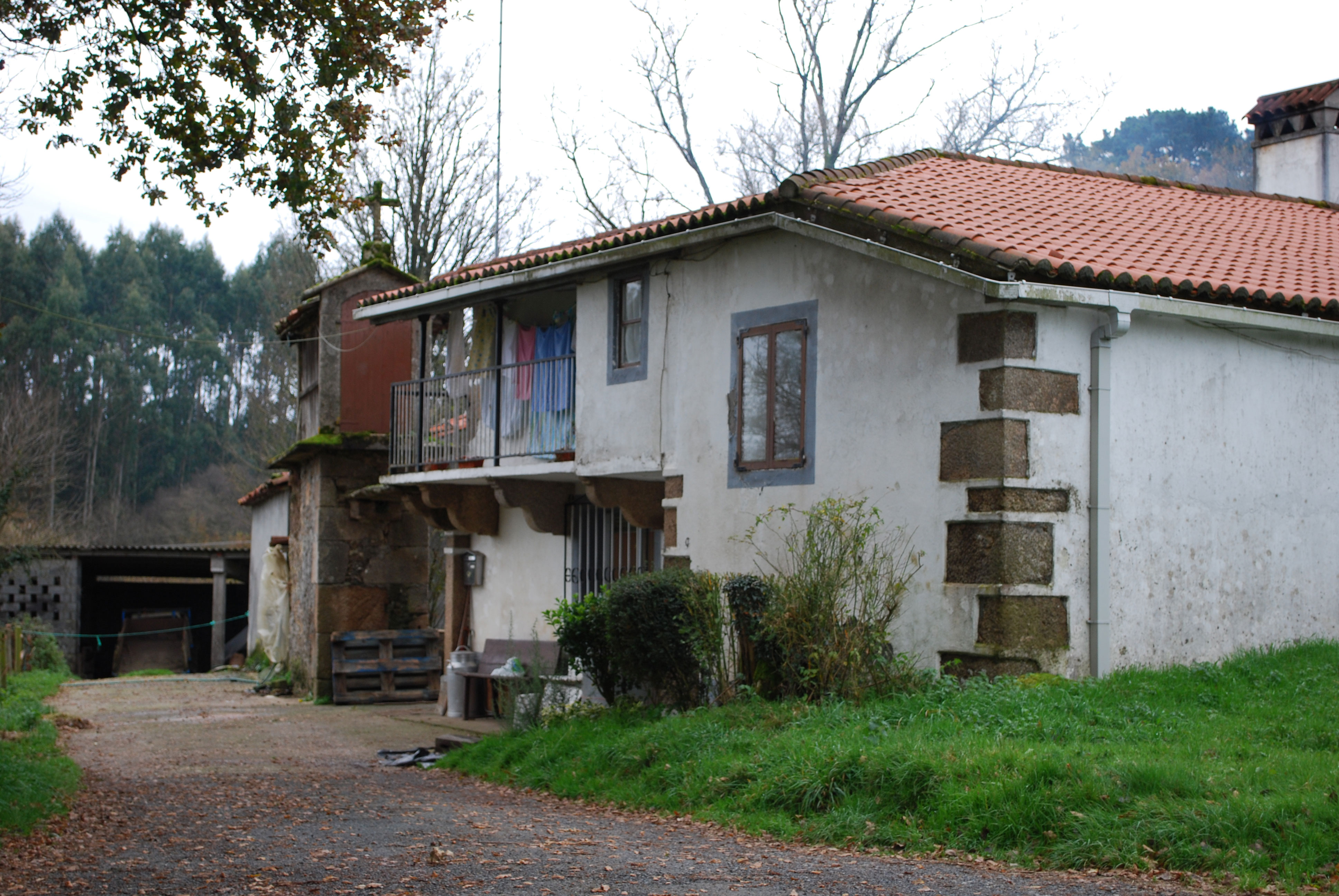 Vista Frádegas Curtis A Coruña Galiza Spain